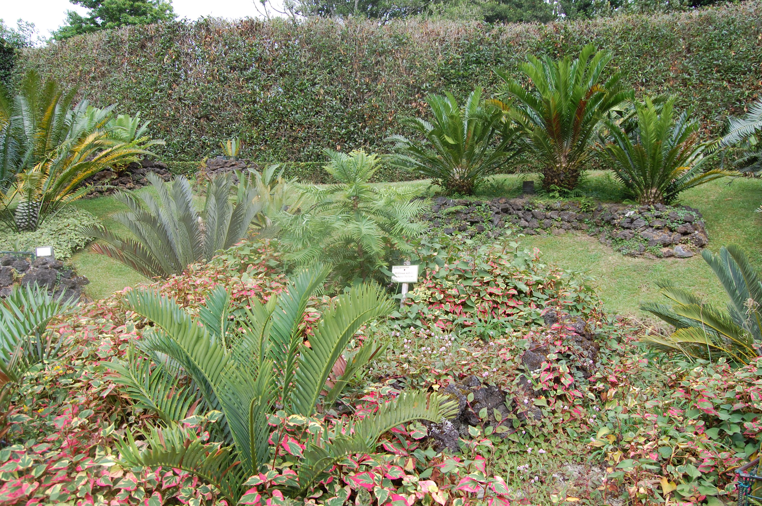 Furnas. Parco Terra Nostra. Valle delle Cycas